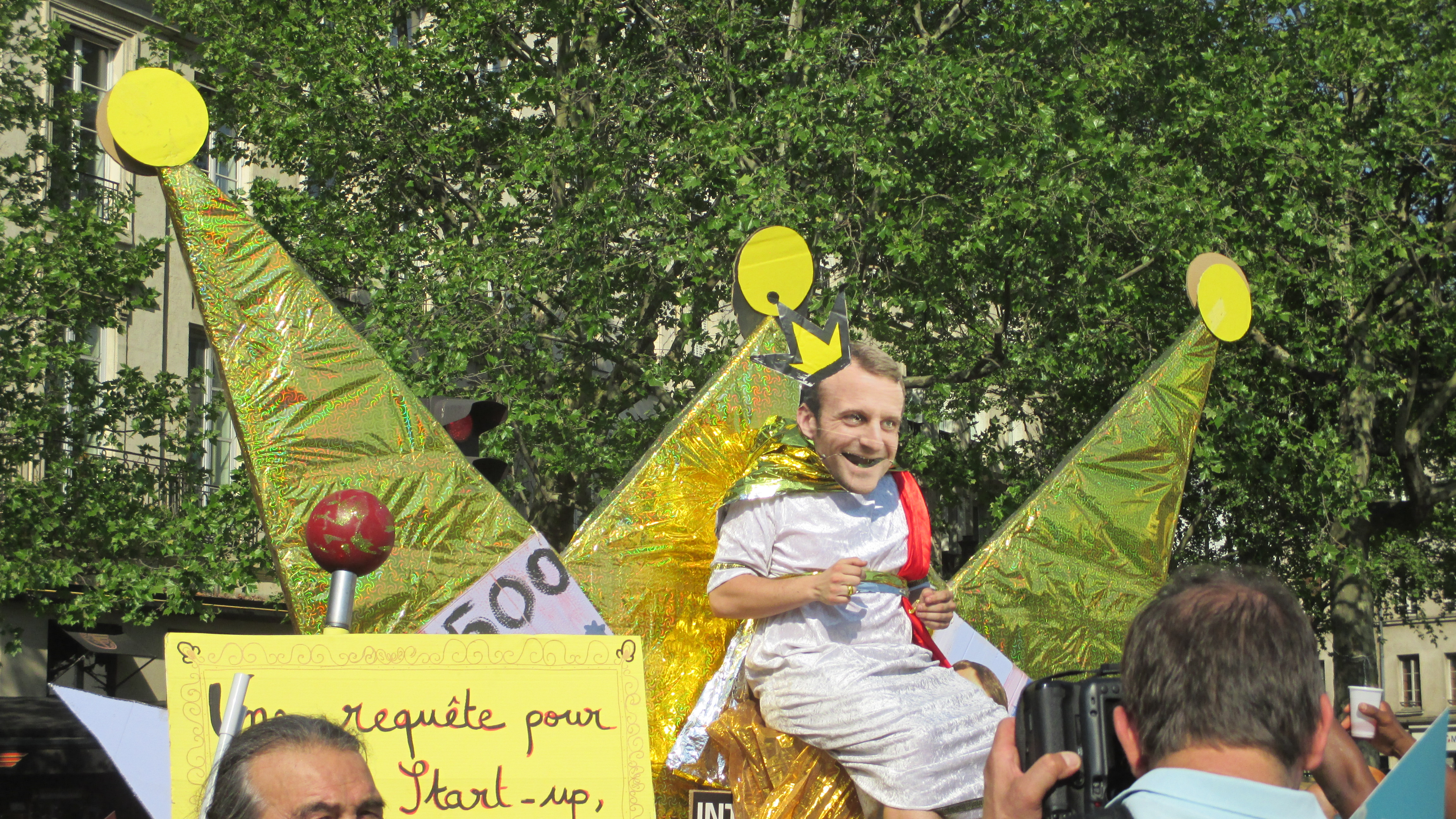 Char "Macron, ta fête commence !" à la manifestation du 5 mai 2018 "La fête à Macron".